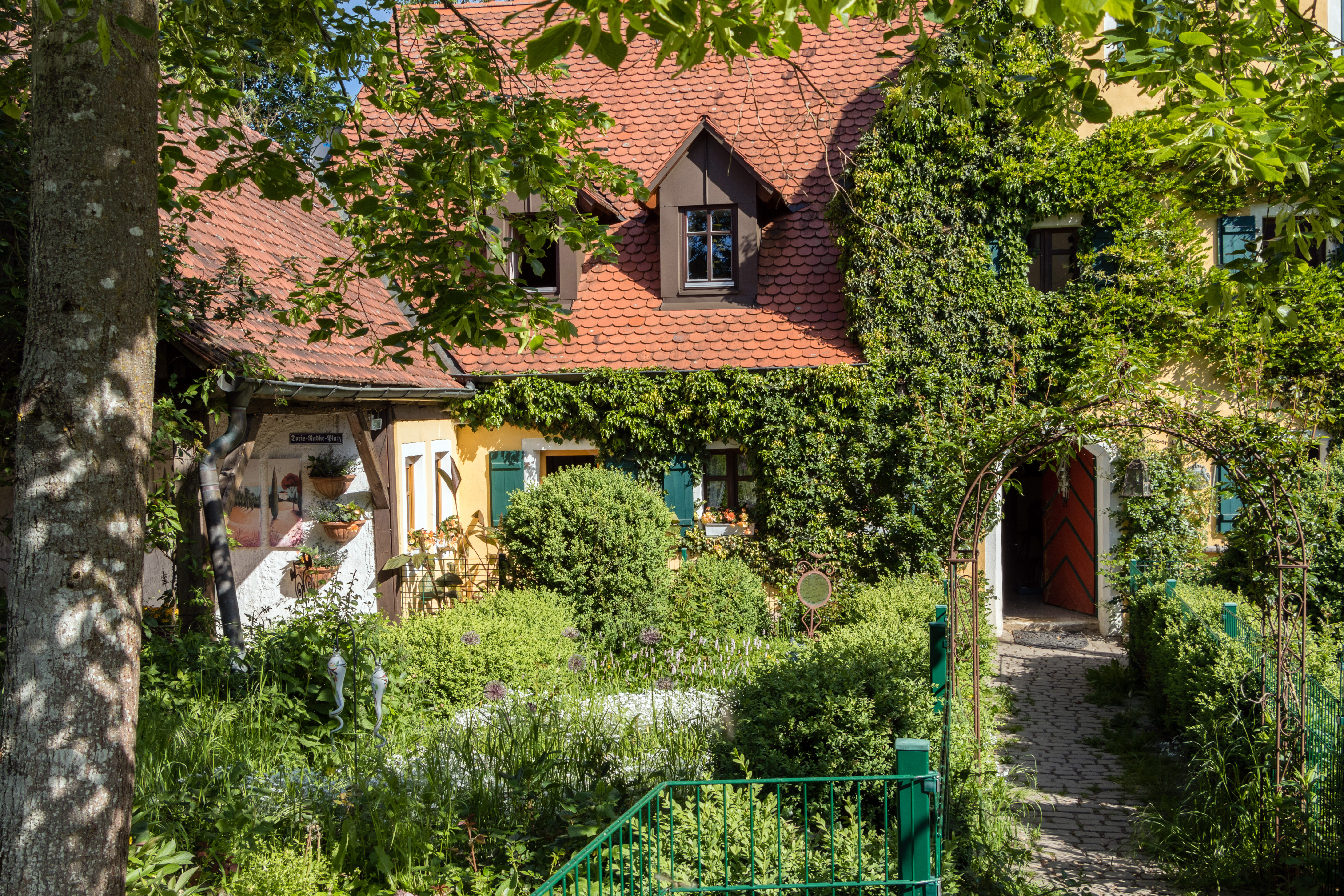 Molsbach, Anwesen